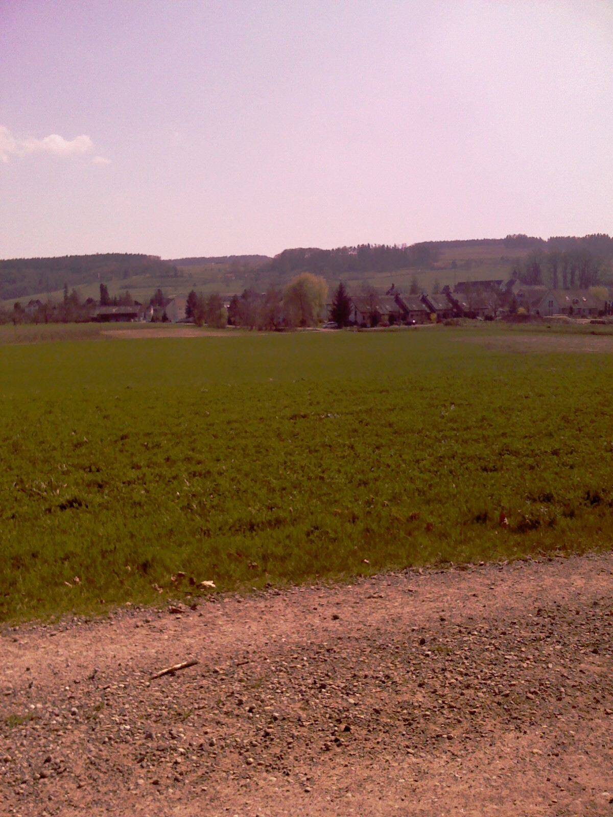 Setlejo Kefikon, komunumo Gachnang, Kantono Turgovio. Vido de parkloko de A7.